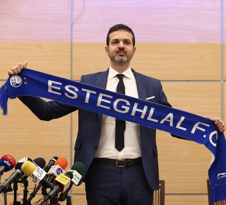 گزارش تصویری از مراسم معارفه و نشست خبری آندره‌آ استراماچونی در تیم استقلال